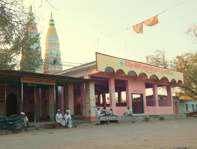 धानोरा (बु.) गावातील मंदिर परिसर.